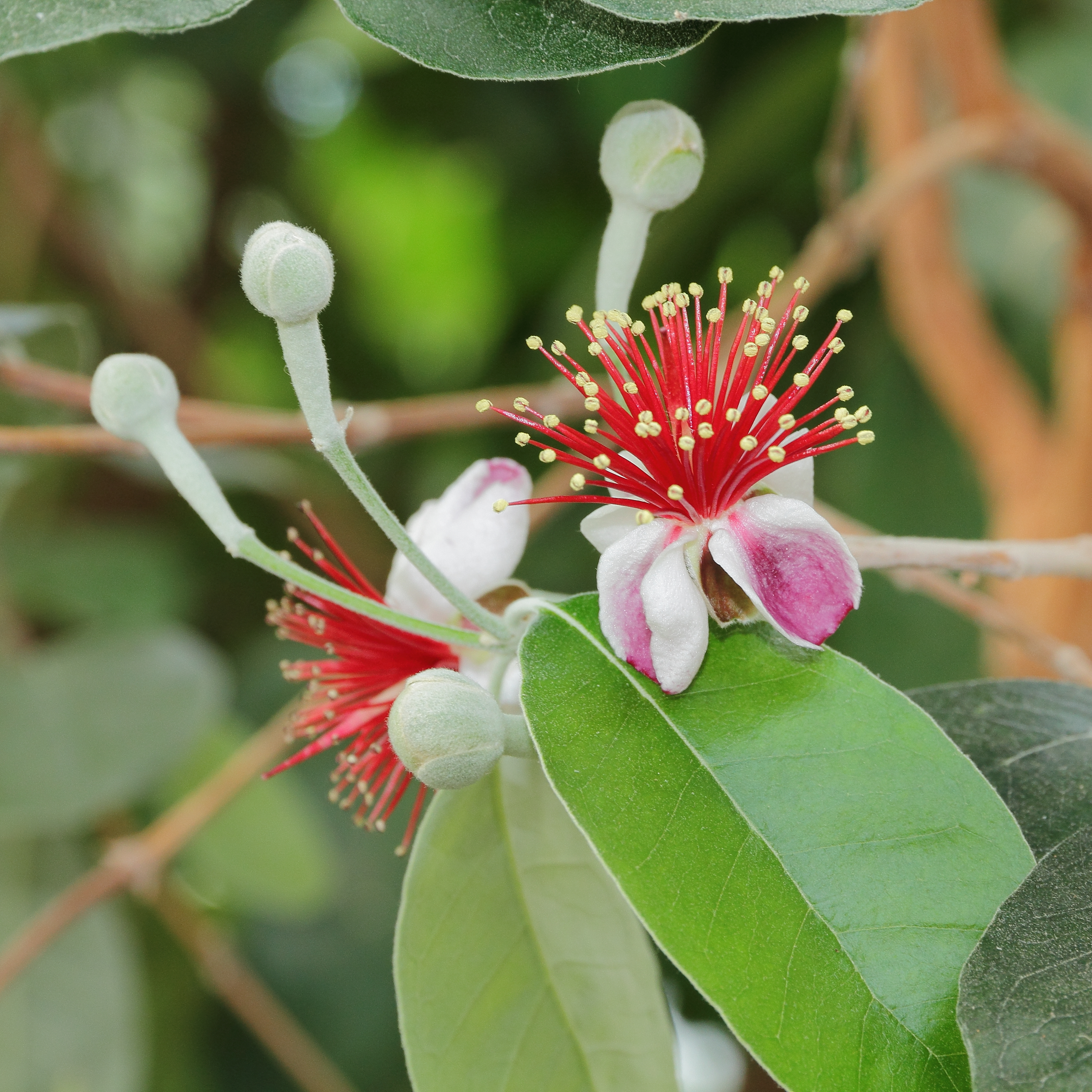 Acca sellowiana i Bergianska trädgården.